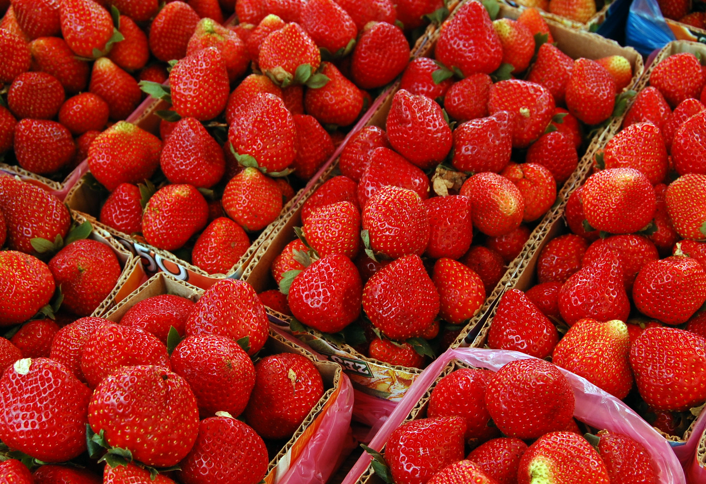 Strawberries